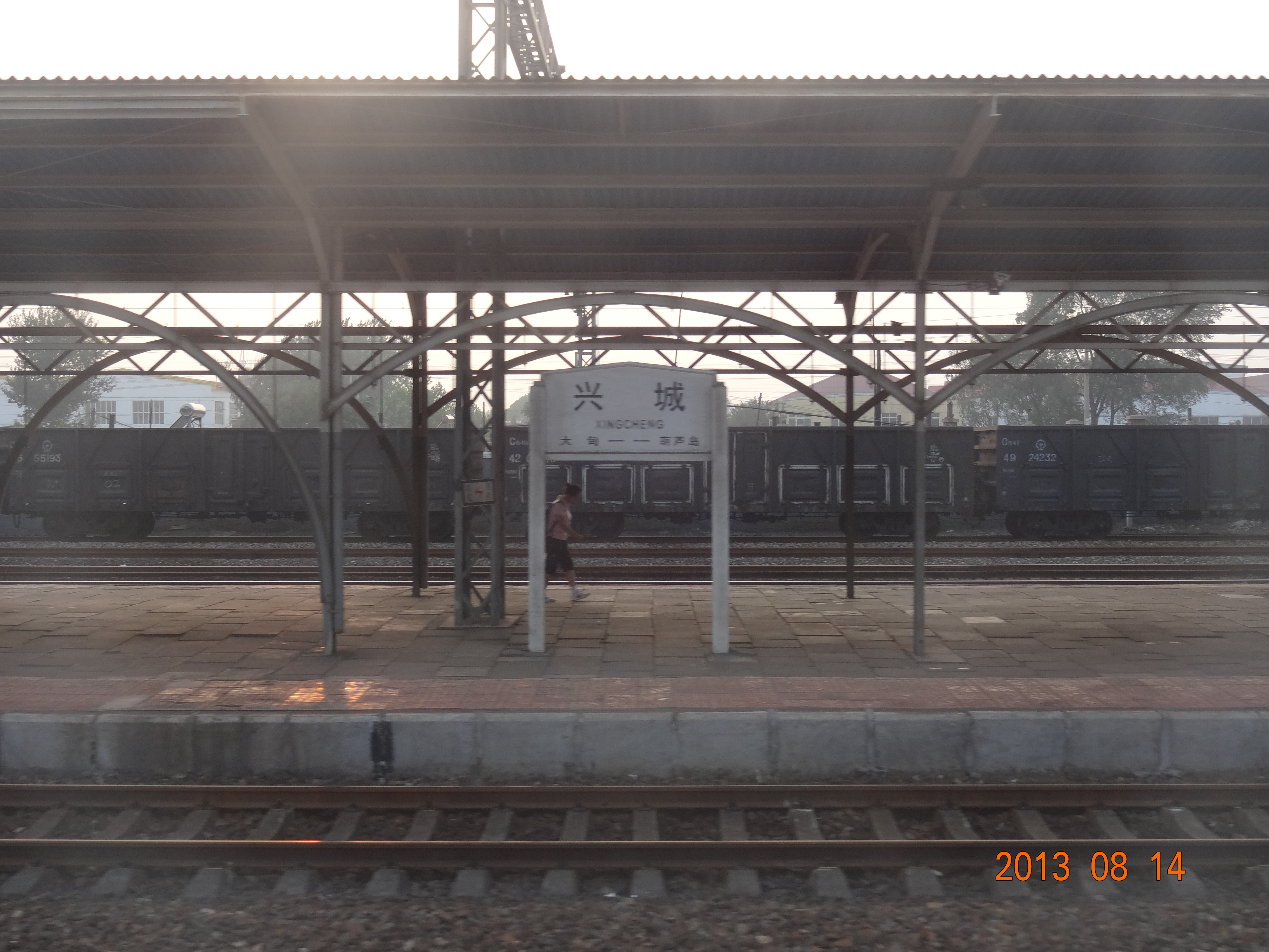 兴城站